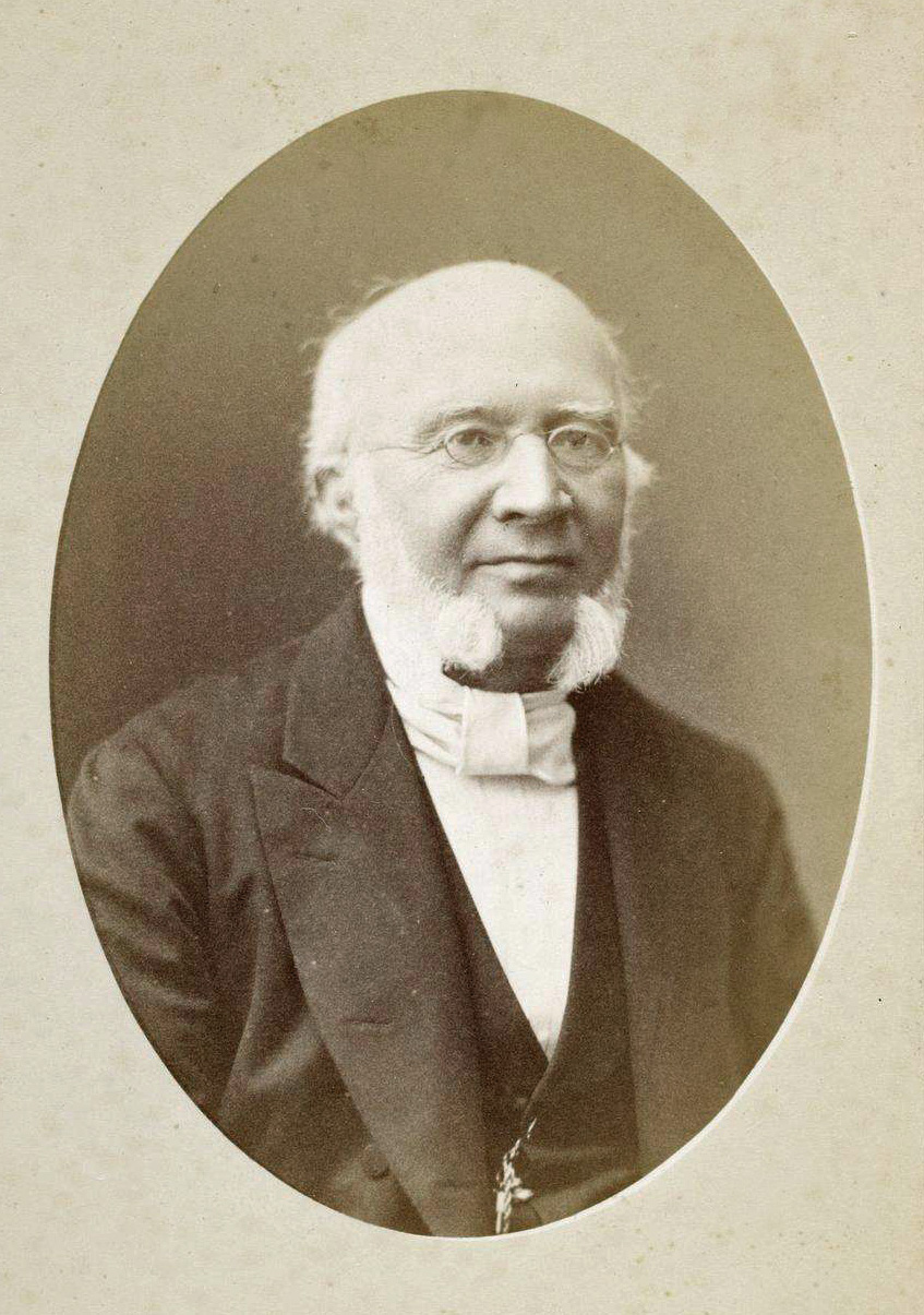 Jean Eugène Casalis. Bibliothèque nationale de France, département Société de Géographie